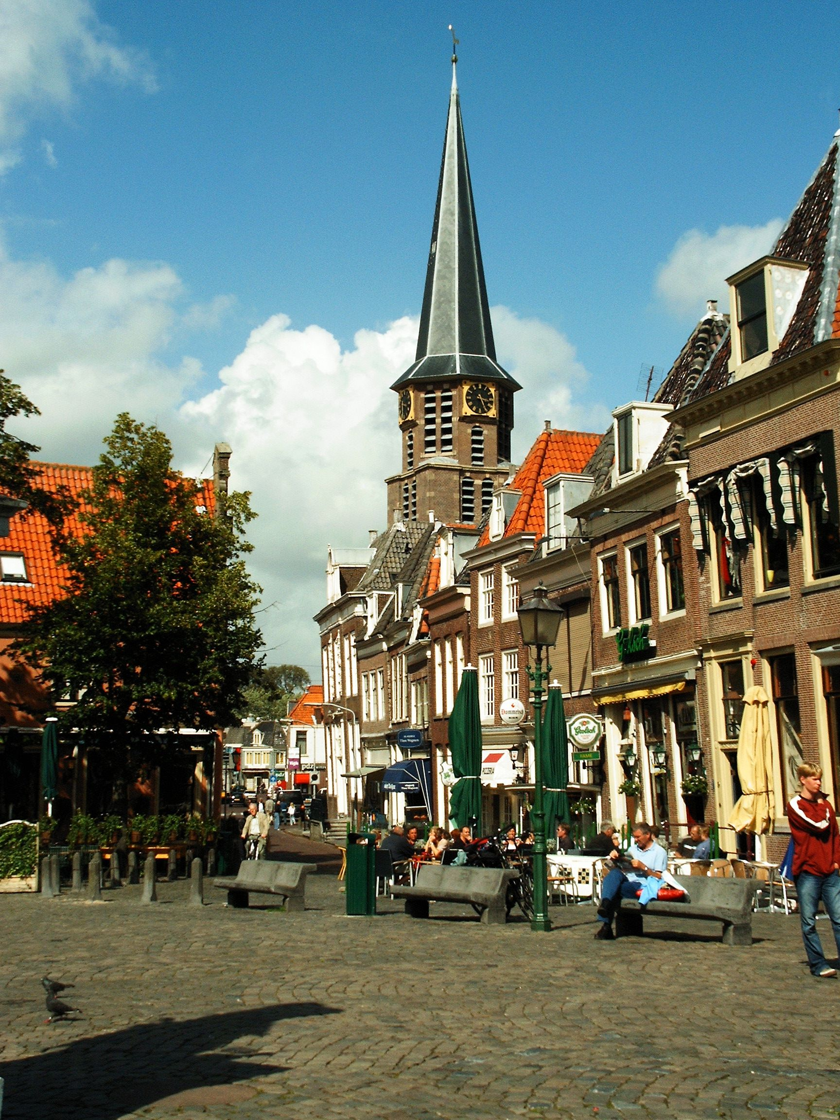 Hoorn - Blick zur großen Kirche